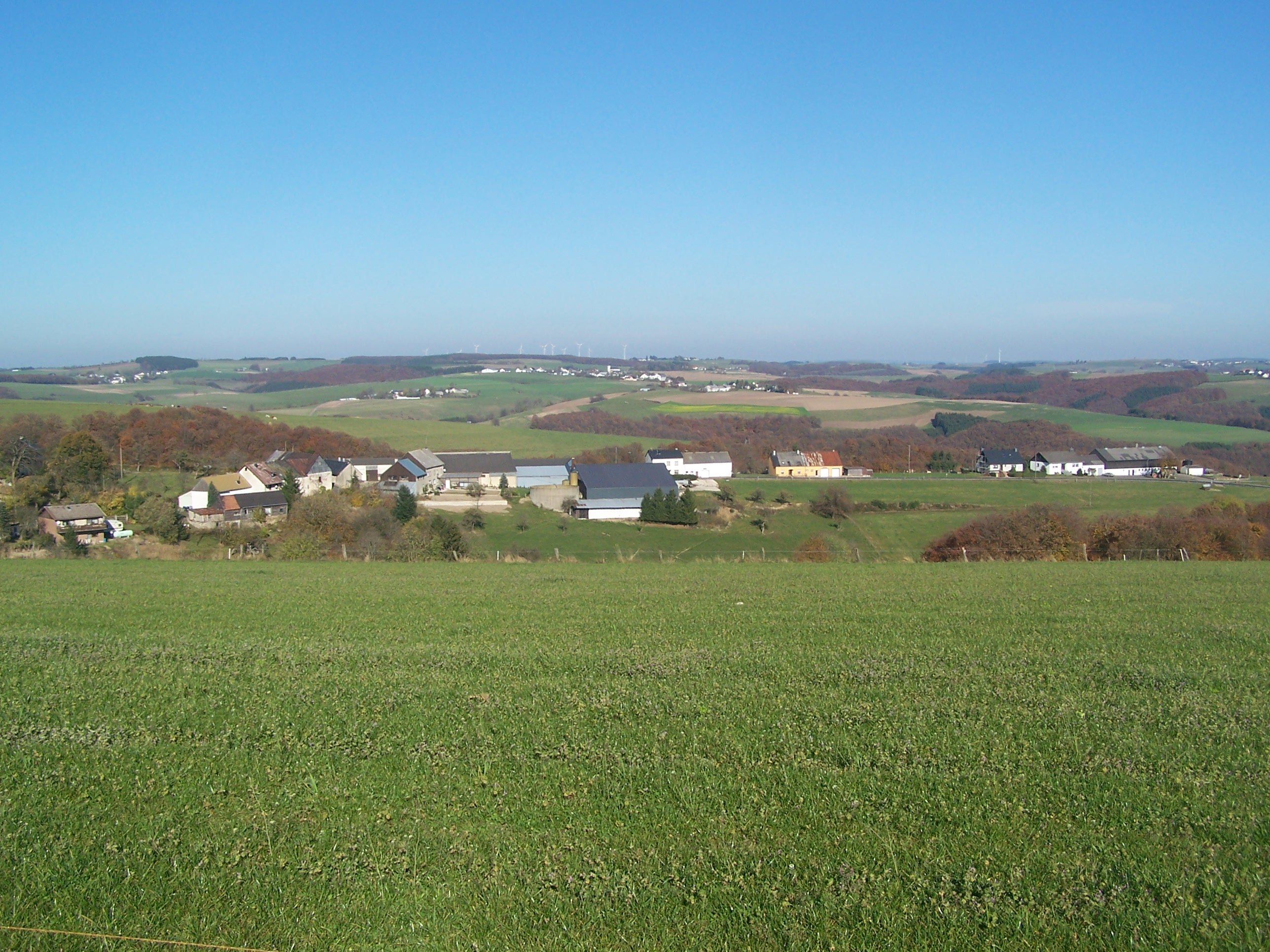 Leimbach (bei Neuerburg). Es handelt sich um das Hauptdorf. Blickrichtung ist in Richtung Enztal/Ammeldingen